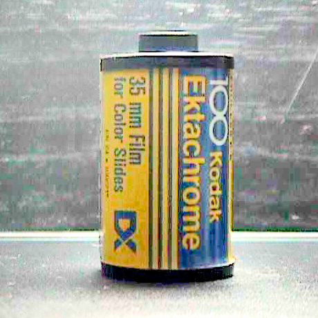 Rollo de pelicula fotografica de 35 mm (Kodak) (2006)